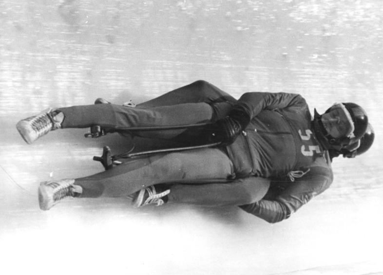 Horst Hörnlein, Reinhard Bredow ADN-ZB Demme 19.12.1971-Oberhof: DDR-Meisterschaften im Rennschlittensport-Ihren Vorjahrestitel im Doppel-Sitzer verteidigten der 26jährige Diplom-Sportlehrer Horst Hörnlein (vorn) und der 24jährige Maschinenbau-Fernstudent Reinhard Bredow (ASK Oberhof) mit Erfolg. Sie erreichten eine Gesamtfahrzeit von 1:32,656 min.